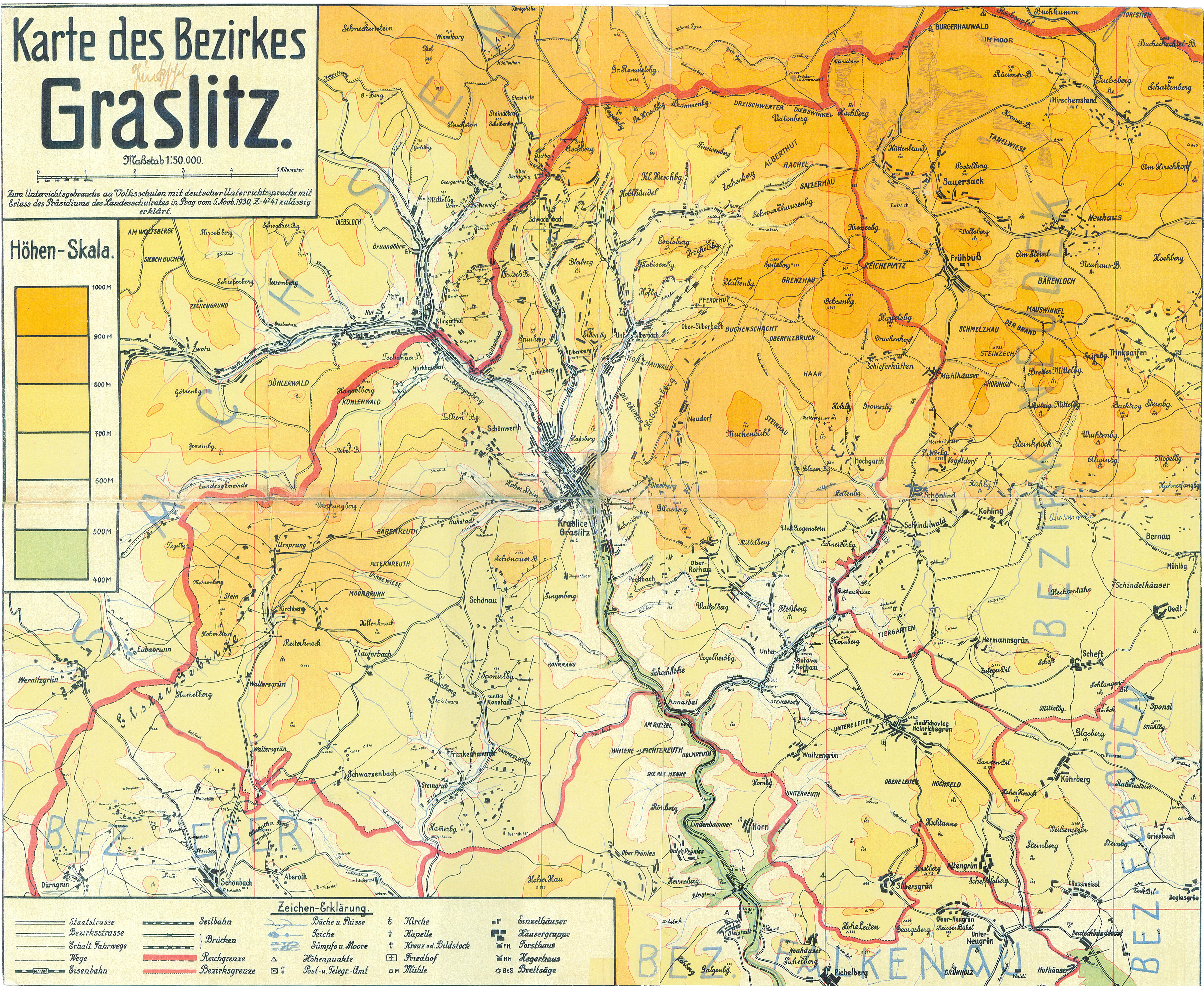 Karte des (politischen) Bezirks Graslitz in der damaligen Tschechoslowakei, ab November 1938 dann Landkreis Graslitz des Sudetenlandes (bis Mai 1945)